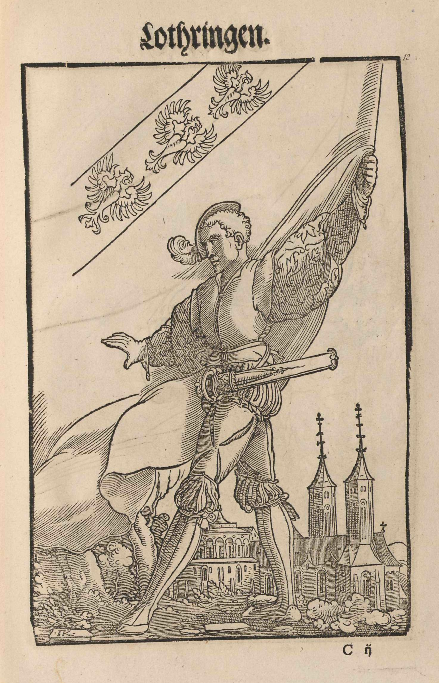 Jacob Koebel (Vorrede): Wapen. Des Heyligen Römischen Reichs Teutscher nation. Gedruckt bei Cyriacus Jacob (evtl. auch Herausgeber/Autor), Frankfurt am Main 1545, Holzschnitte von Jacob Kallenberg. Zu Angaben zur Tingierung (Farbgebung) der Wappen siehe das Register ab Bild Nr. 165. Lothringen